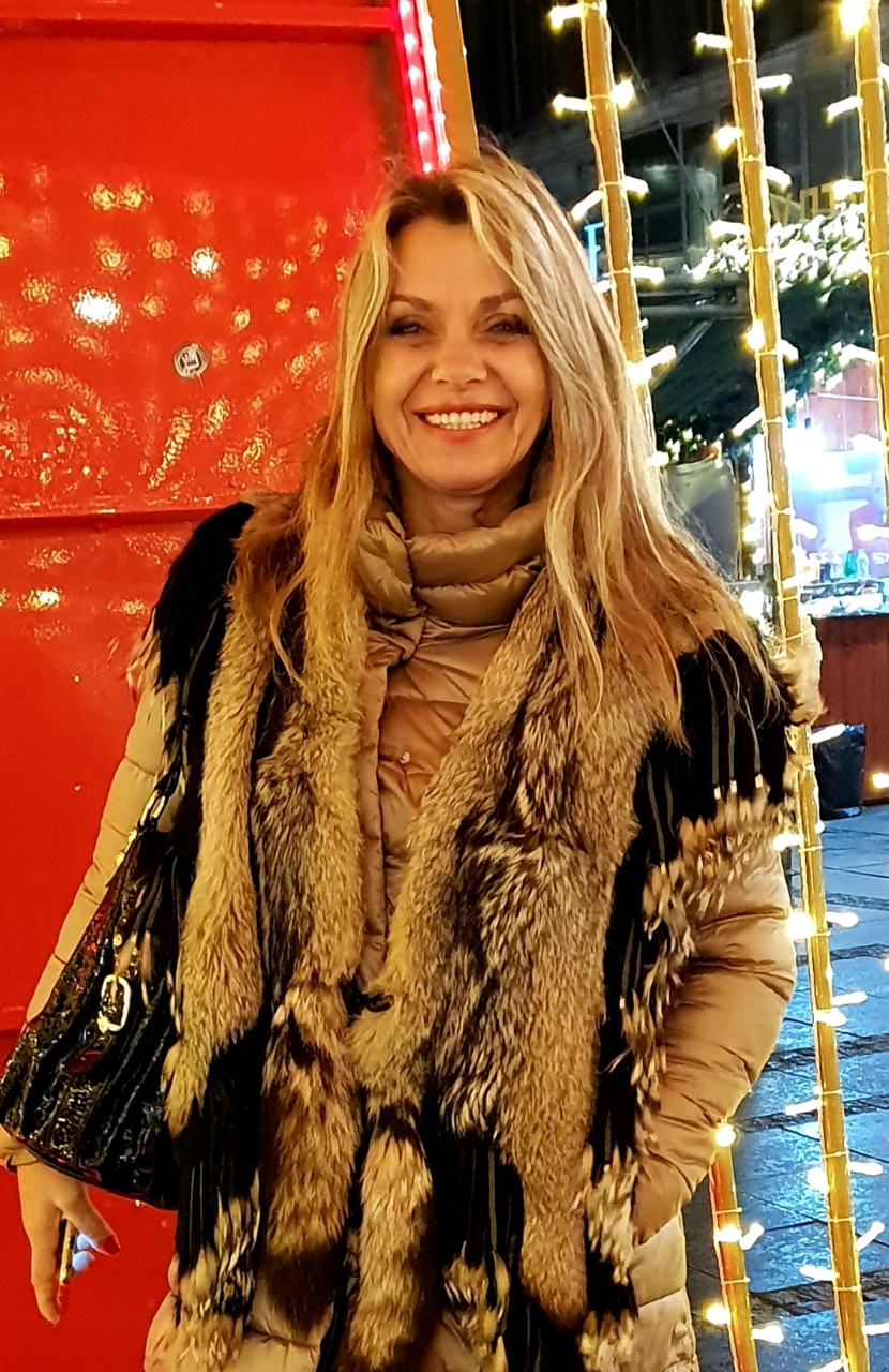 Тамара Симић Васић - академски сликар